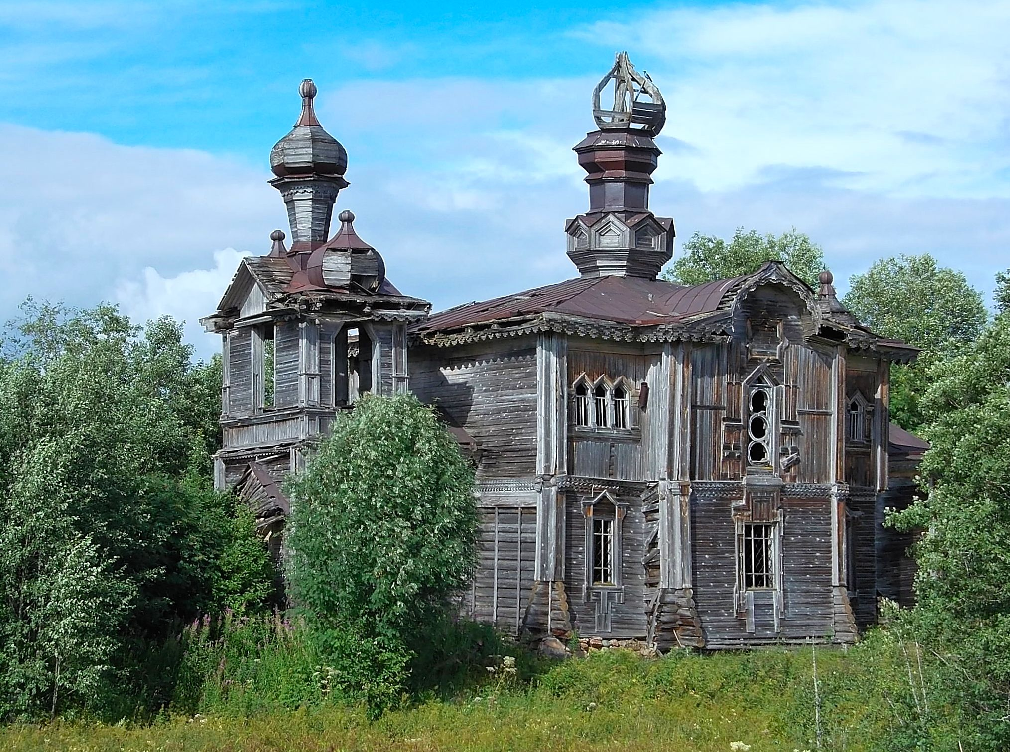 Нуждающаяся в реставраци церковь Порока Елисея в д. Яковлевская